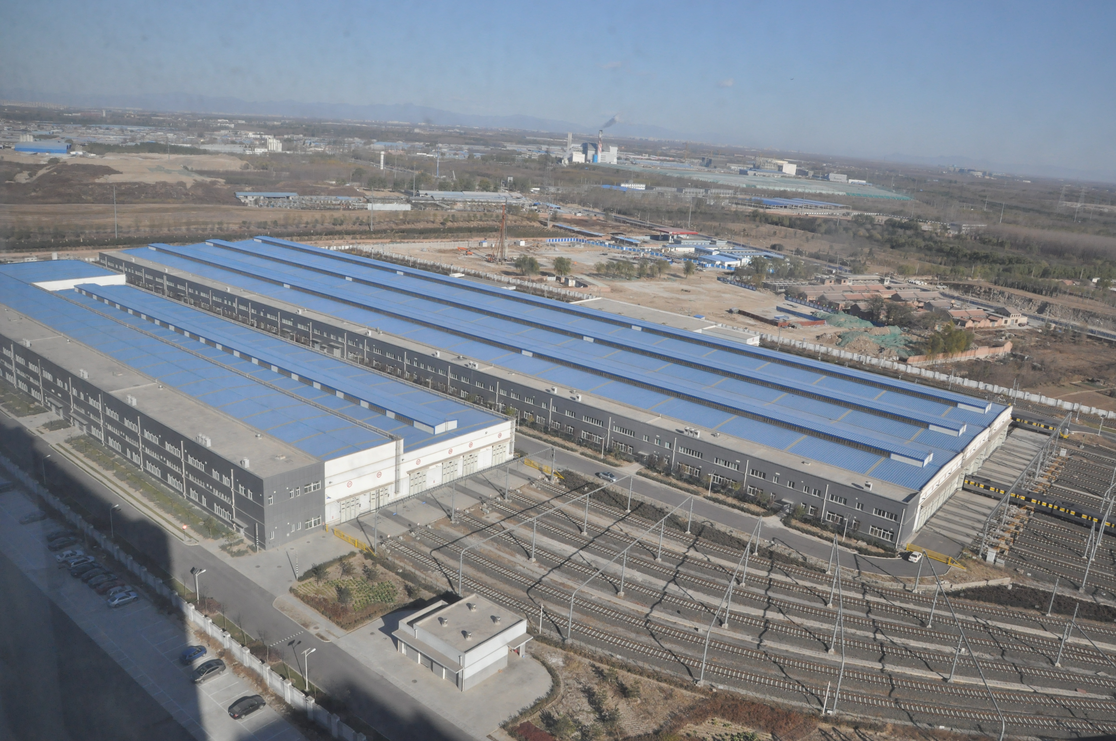 北京地铁6号线五里桥车辆段联合检修库（左）和运用库（右）。摄于中弘北京像素北区1号楼14层。